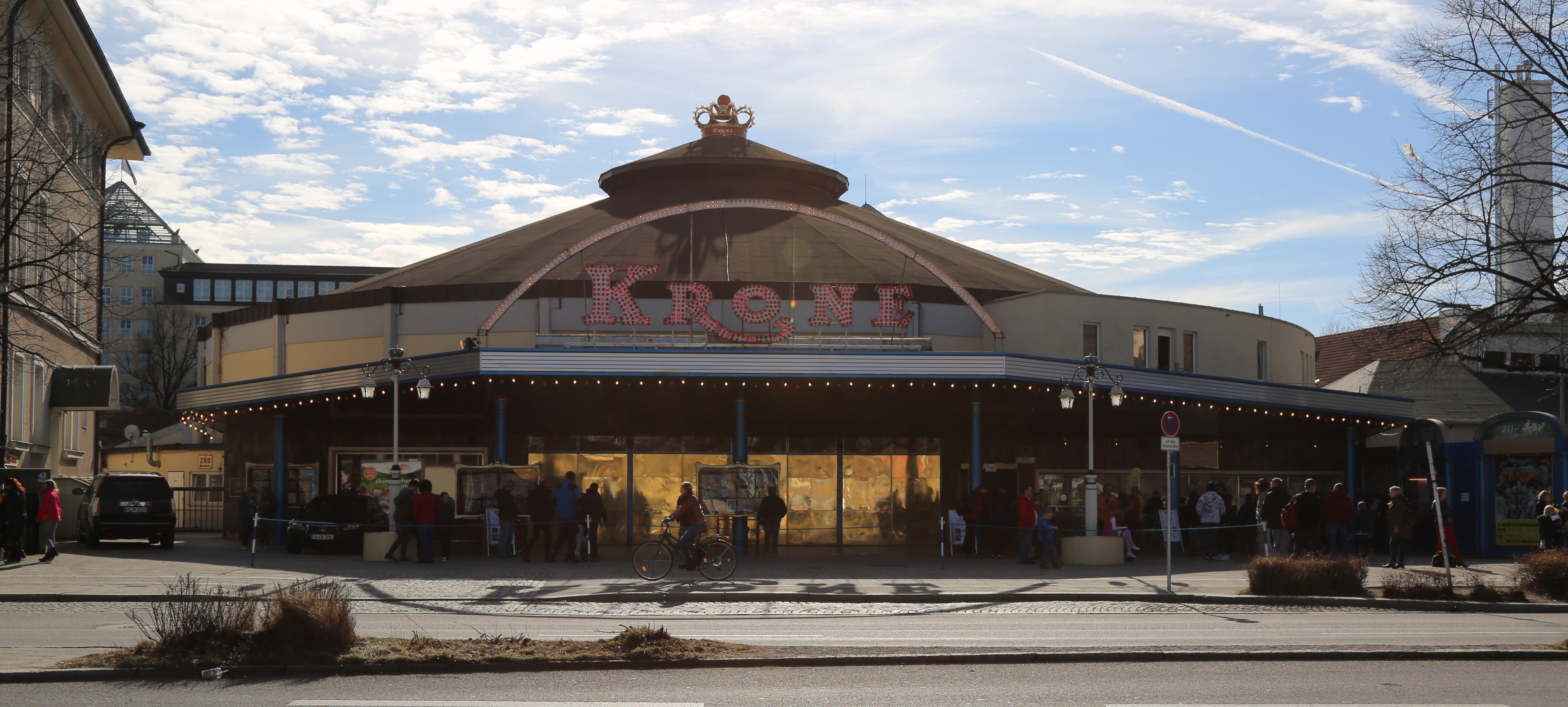 Der Kronebau im Jahr 2017